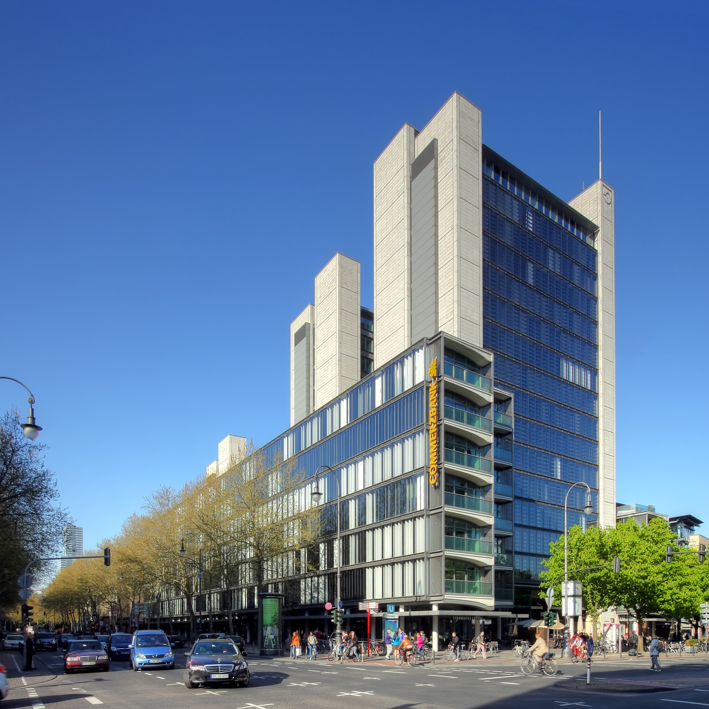 Gerling Ring-Karree, Ansicht von der Kreuzung Hohenzollernring/Magnusstraße, Köln. Architekt: Norman Foster, Baujahr: 1999-2001